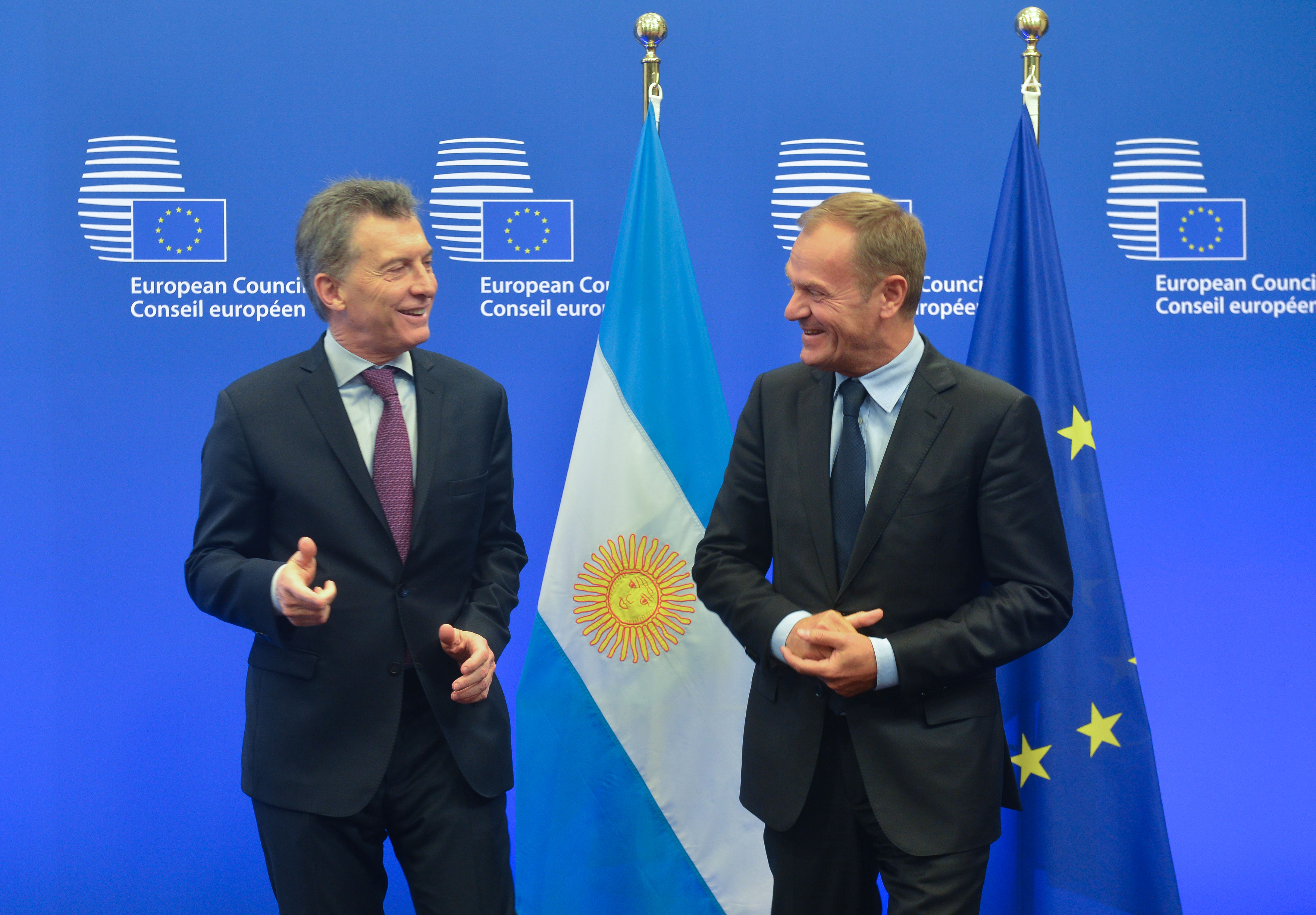 El Jefe de Estado se reunió en el Edificio Berlaymont con las autoridades de la UE, encabezadas por la Alta Representante y Vicepresidente de la Comisión Europea, Federica Mogherini, en un encuentro que estuvo orientado a ampliar el comercio con el Viejo Mundo.